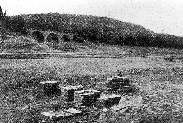 Original image description from the Deutsche Fotothek Dippoldiswalde-Malter. Rote Mühle, Fundamente, am Grund der Talsperre Malter, aus: Die Mühle vom 31.10.1929